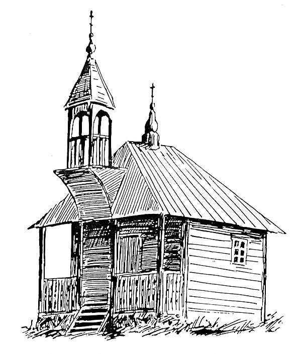 Православная часовня в водской деревне Маттия. Рисунок.